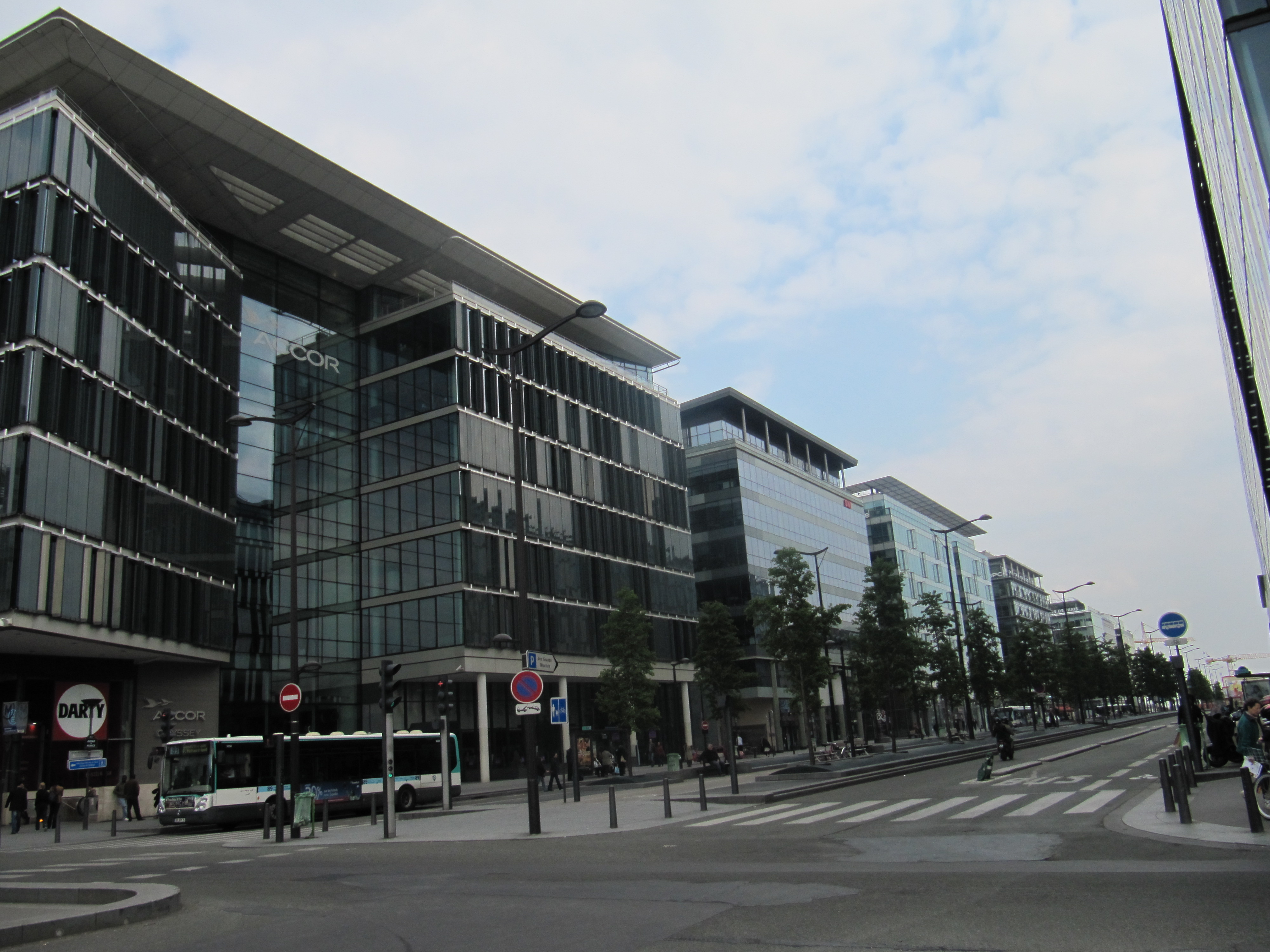 Nouveau Quartier Paris Rive Gauche Français cadien: Un des plus grand chantier de France , Paris Rive Gauche